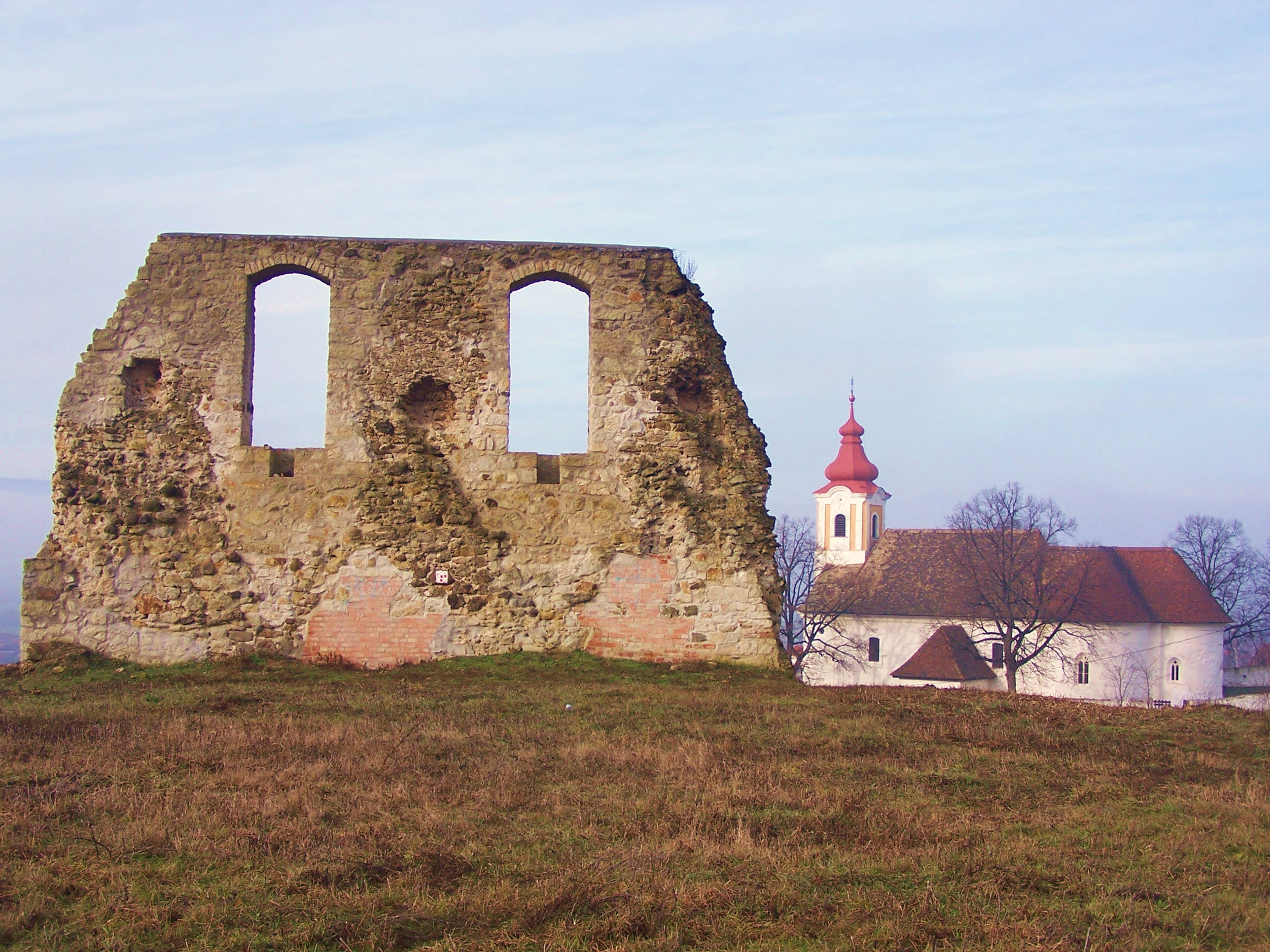 Tari család udvarháza (Tar, Mátrai út) This is a photo of a monument in Hungary. Identifier: 6840